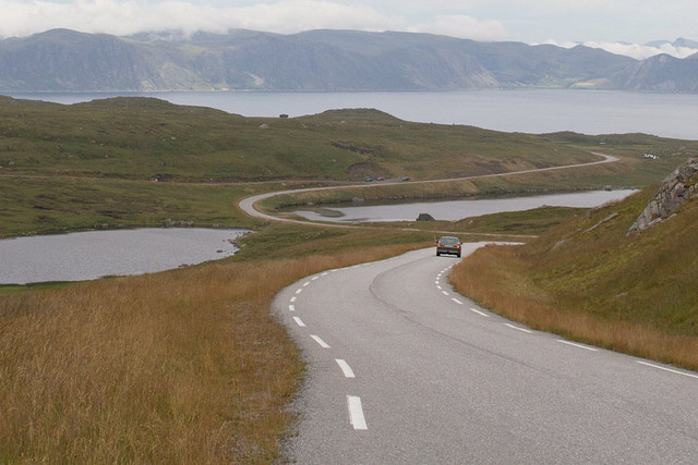 00143_lzn-1.jpg Fv600 forbi Movatna